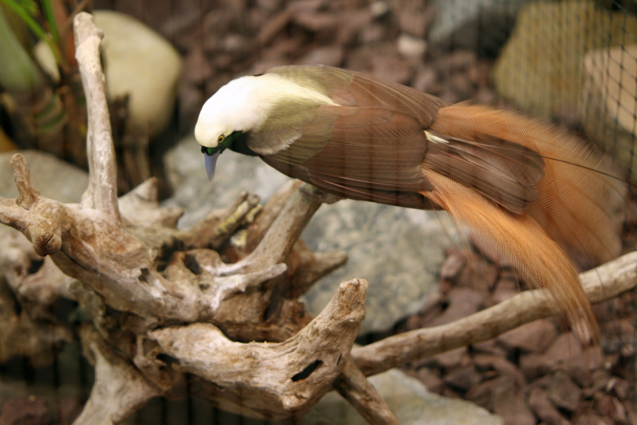 Bird-of-Paradise (Paradisaea raggiana)